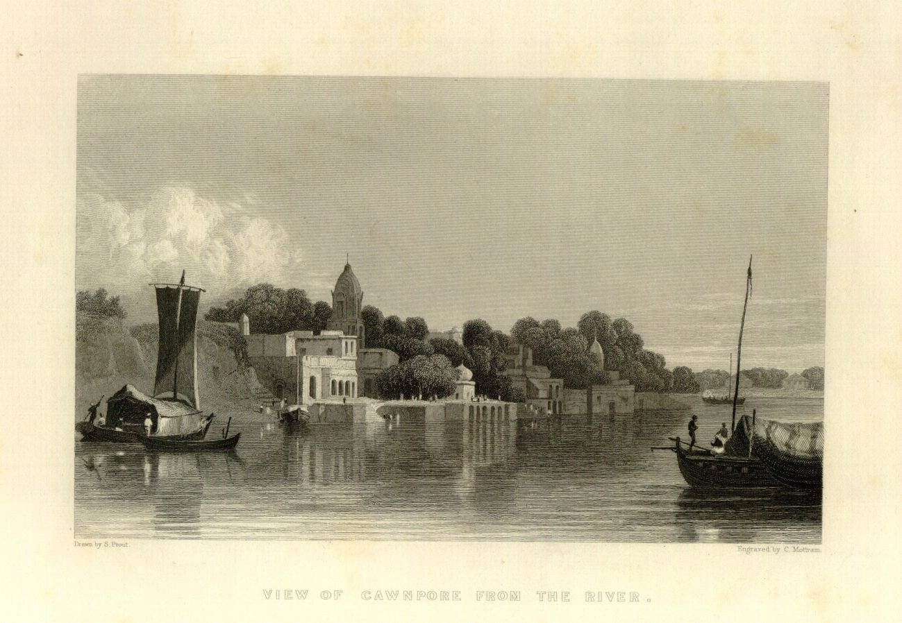 Teckning över Cawnpore från vattnet. 1810.